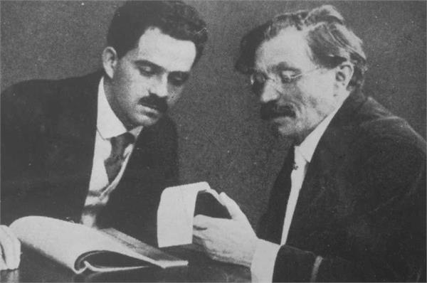 י. ד. ברקוביץ ושלום עליכם